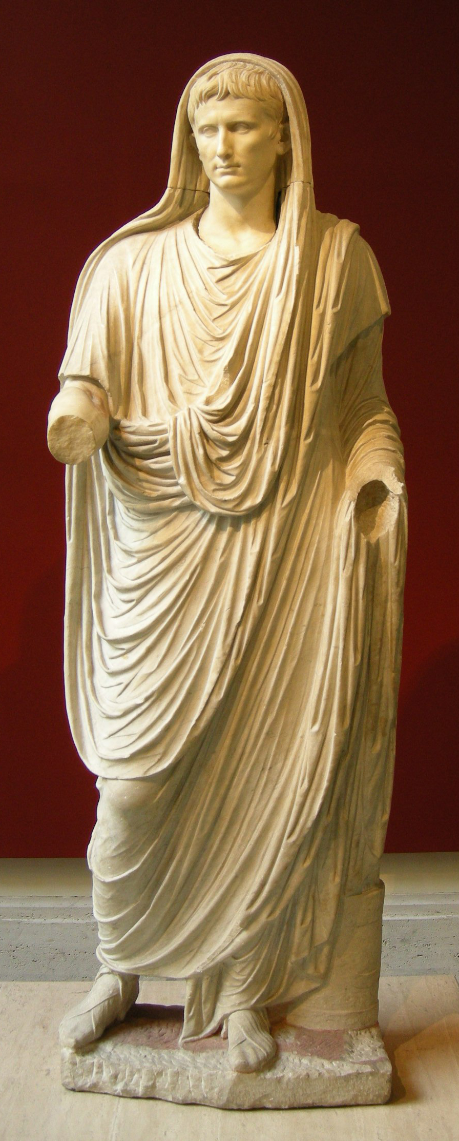 Augusto nelle vesti di pontifex maximus: testa curvata, vestito della toga e calzando calcei patricii (calzature riservate ai patrizi), estende il braccio destro per versare la libagione; una cupsa (contenitore per documenti ufficiali) giace ai suoi piedi. Marmo greco (testa e braccia) e italico (corpo), opera romana della fine del periodo augusteo, ultima decate del I secolo a.C.AC, rinvenuta alle pendici del colle Oppio, in via Labicana e conservata al Museo Nazionale Romano di Palazzo Massimo alle Terme, Roma.